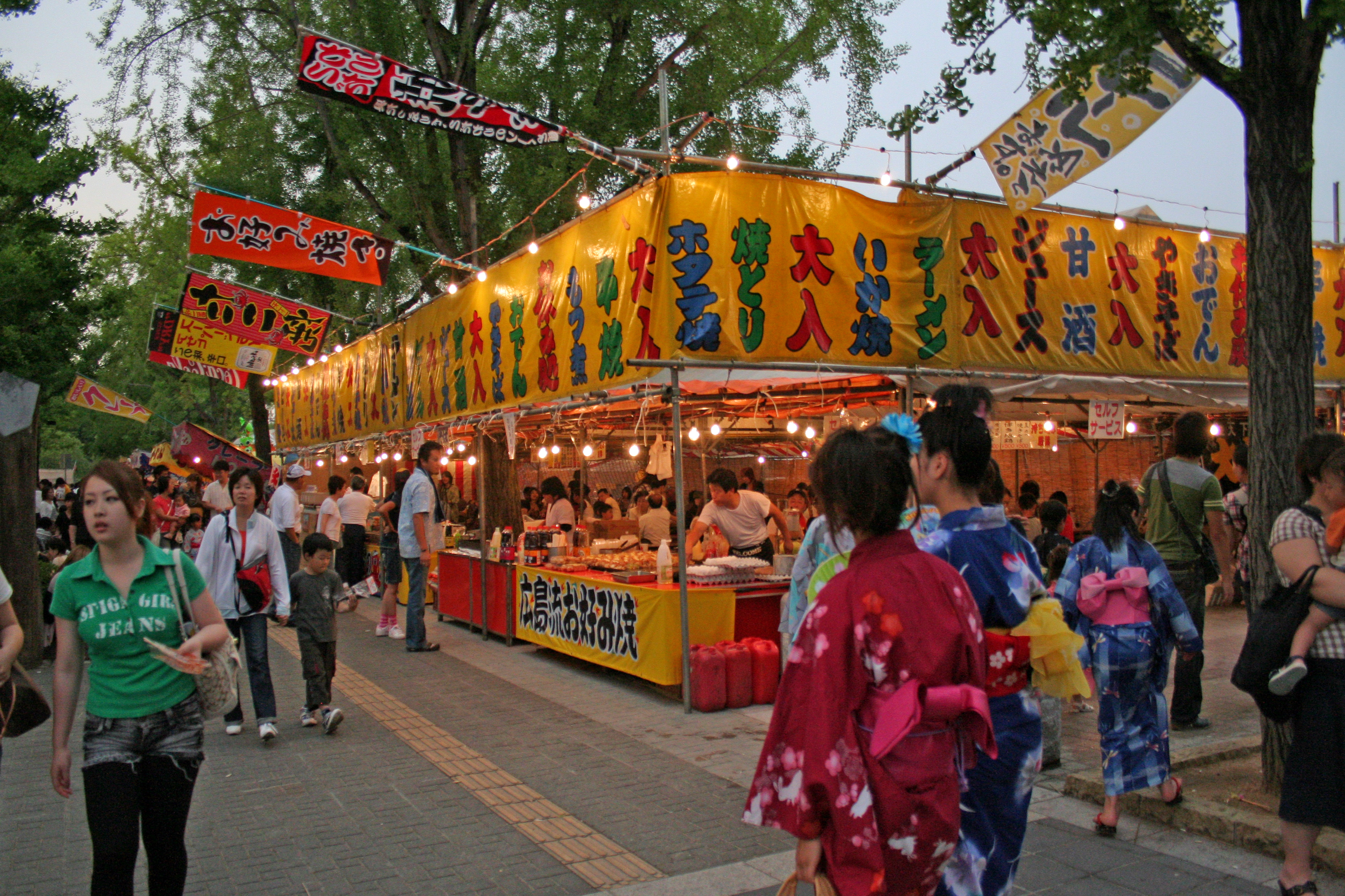 2009年6月22日から23日にかけて、姫路市大手前通りにて開催された「姫路ゆかた祭」。2つ日間にかけて行なわれた祭の風景。注意:ファイル番号及び日時は撮影時系列純にはなっておりません。また、性別、年齢、国籍などによる分類は推定で行なっております。 大手前公園にある巨大屋台。